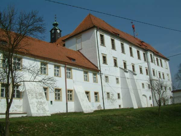 Schutzburg Oberradkersburg: Datum: de:2003 Ort: Oberradkersburg, Slowenien